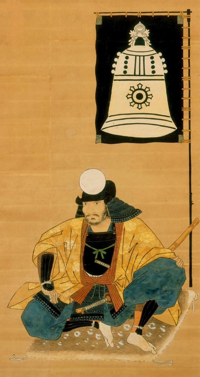 梅津憲忠の肖像。